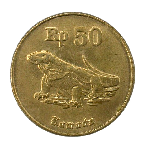 Komodo coin